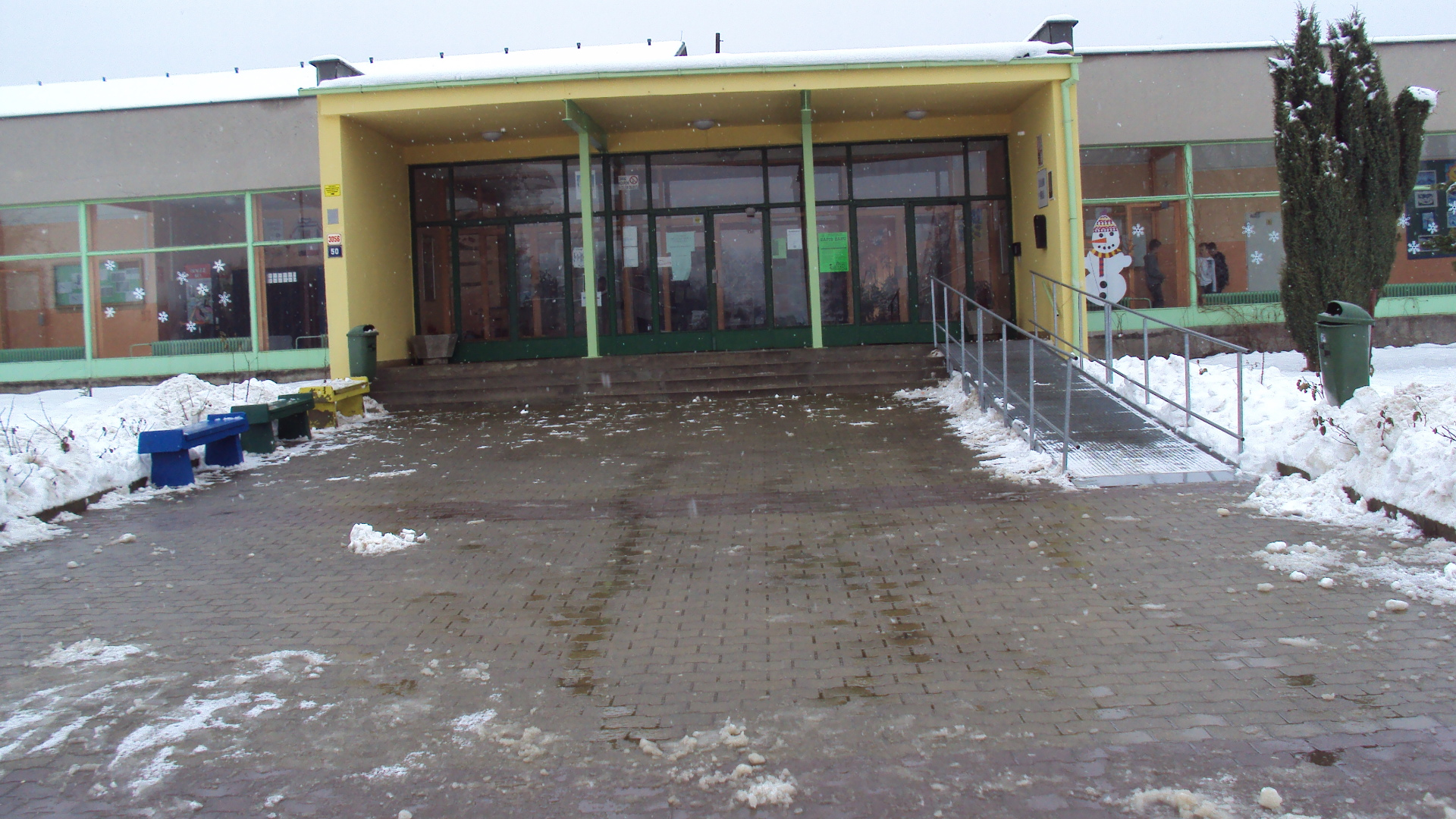 Vstup do ZŠ Slovanka, ul.Ant.Sovy 3056